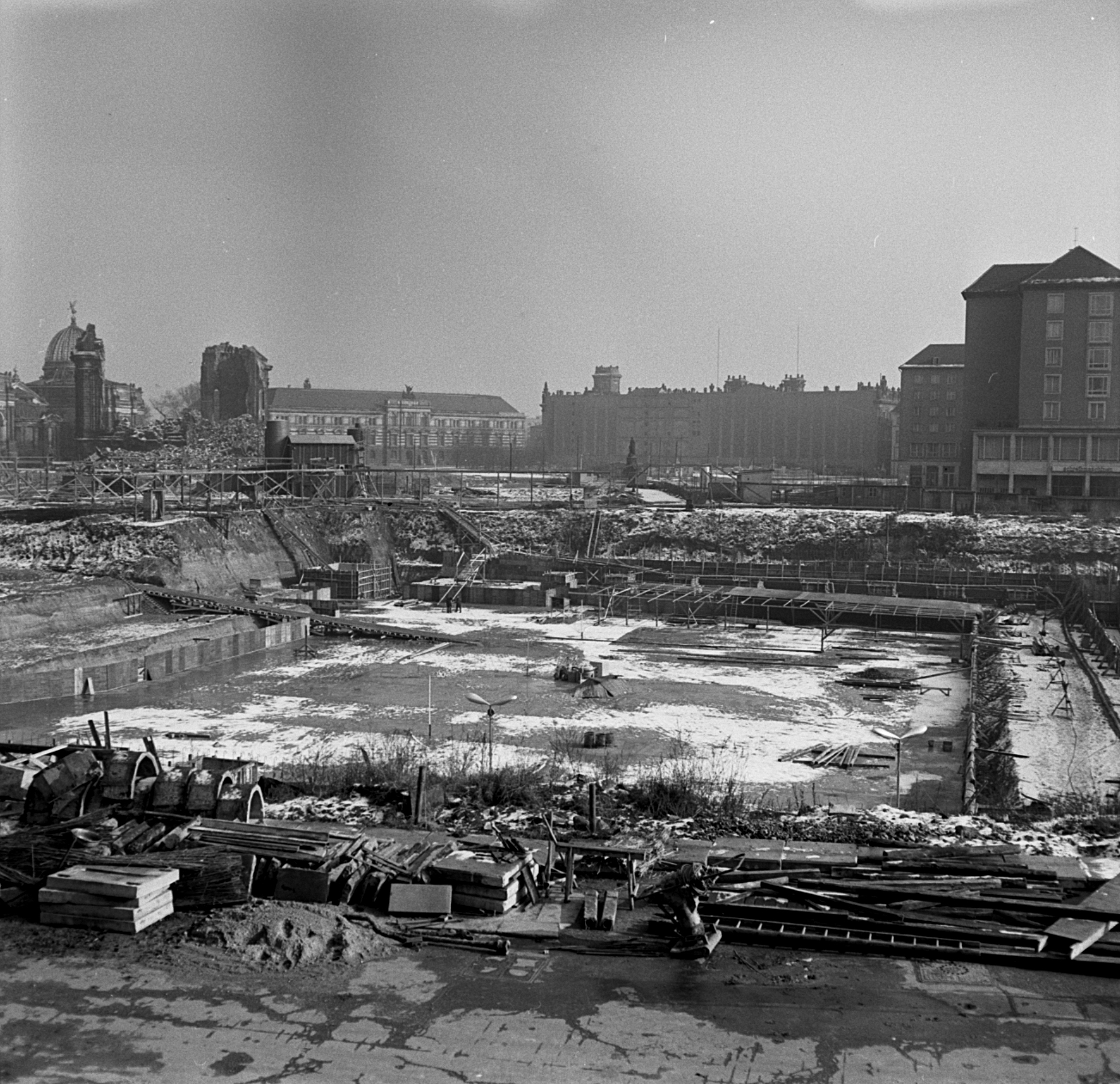 Fundamente beim Bau des Dresdner Kulturpalastes. Im Hintergrund die Ruine der Frauenkirche und das Polizeipräsidium